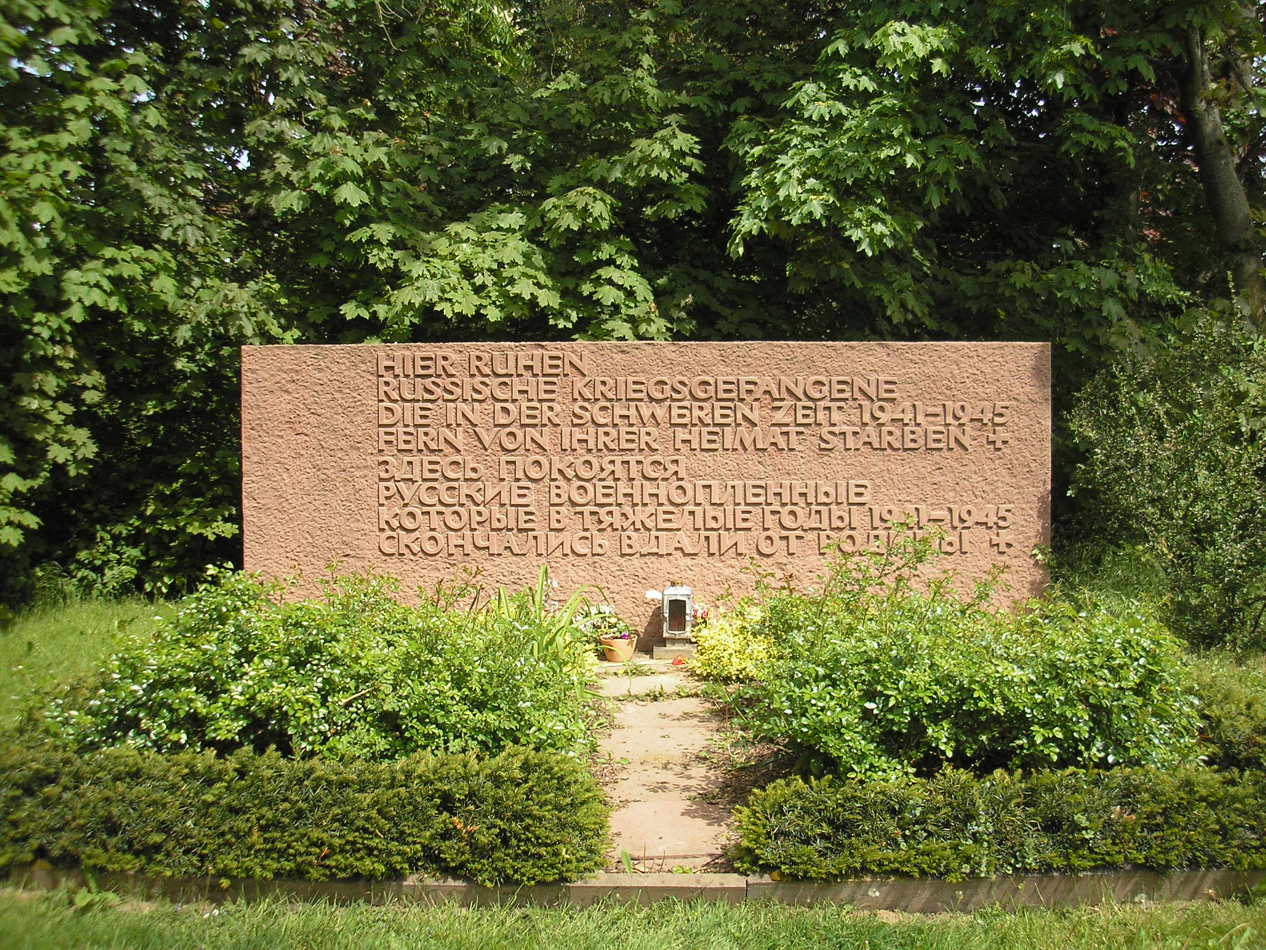 Gedenkstein